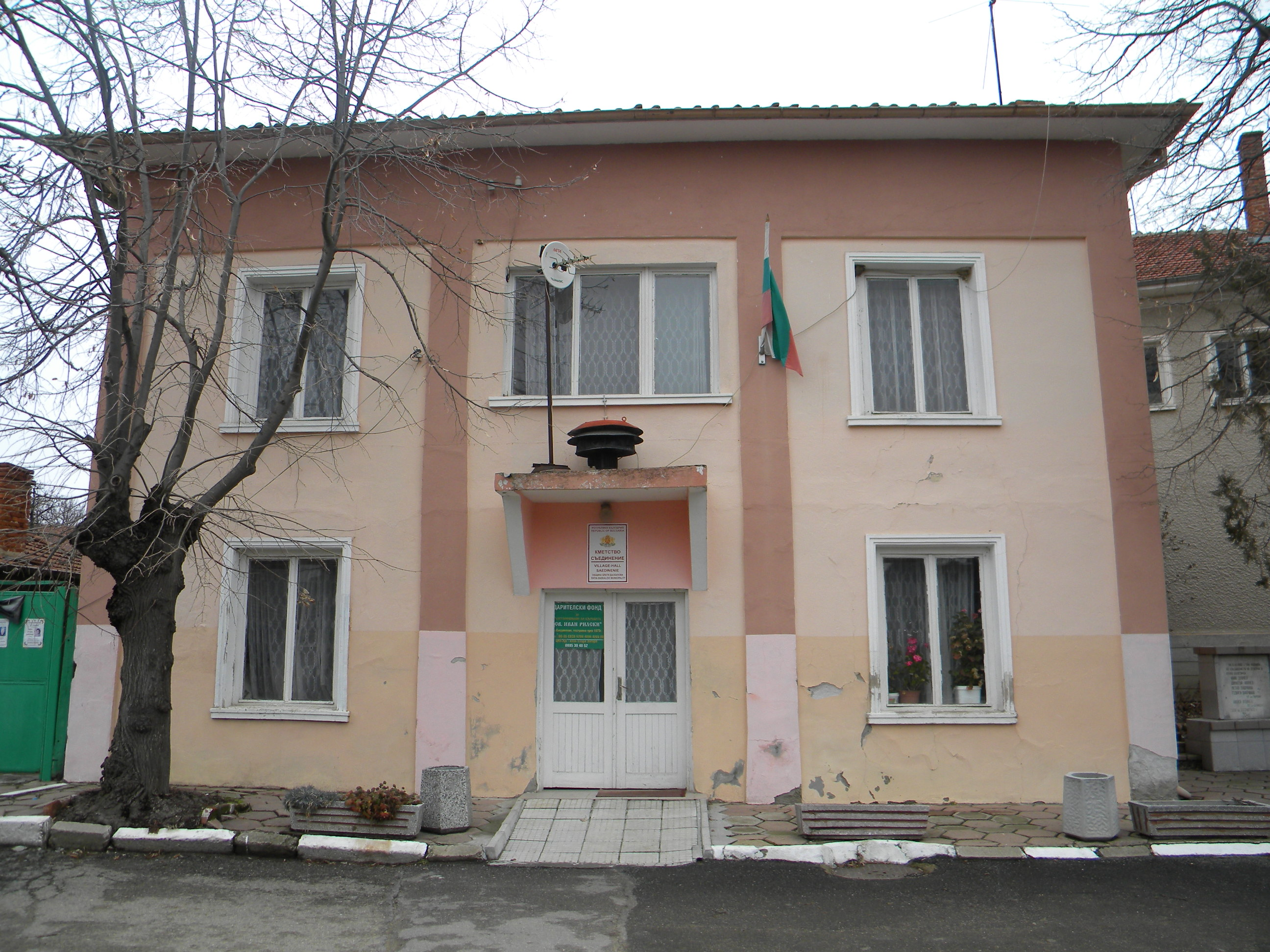 Кметство в село Съединение